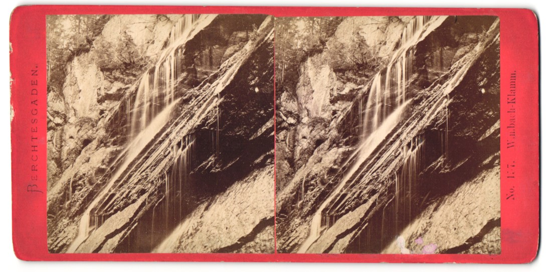 Stereo-Fotografie Baldi & Würthle, Salzburg, Ansicht Ramsau bei Berchtesgaden, Wimbach-Klamm, Größe ca. 18,0 x 9,0cm